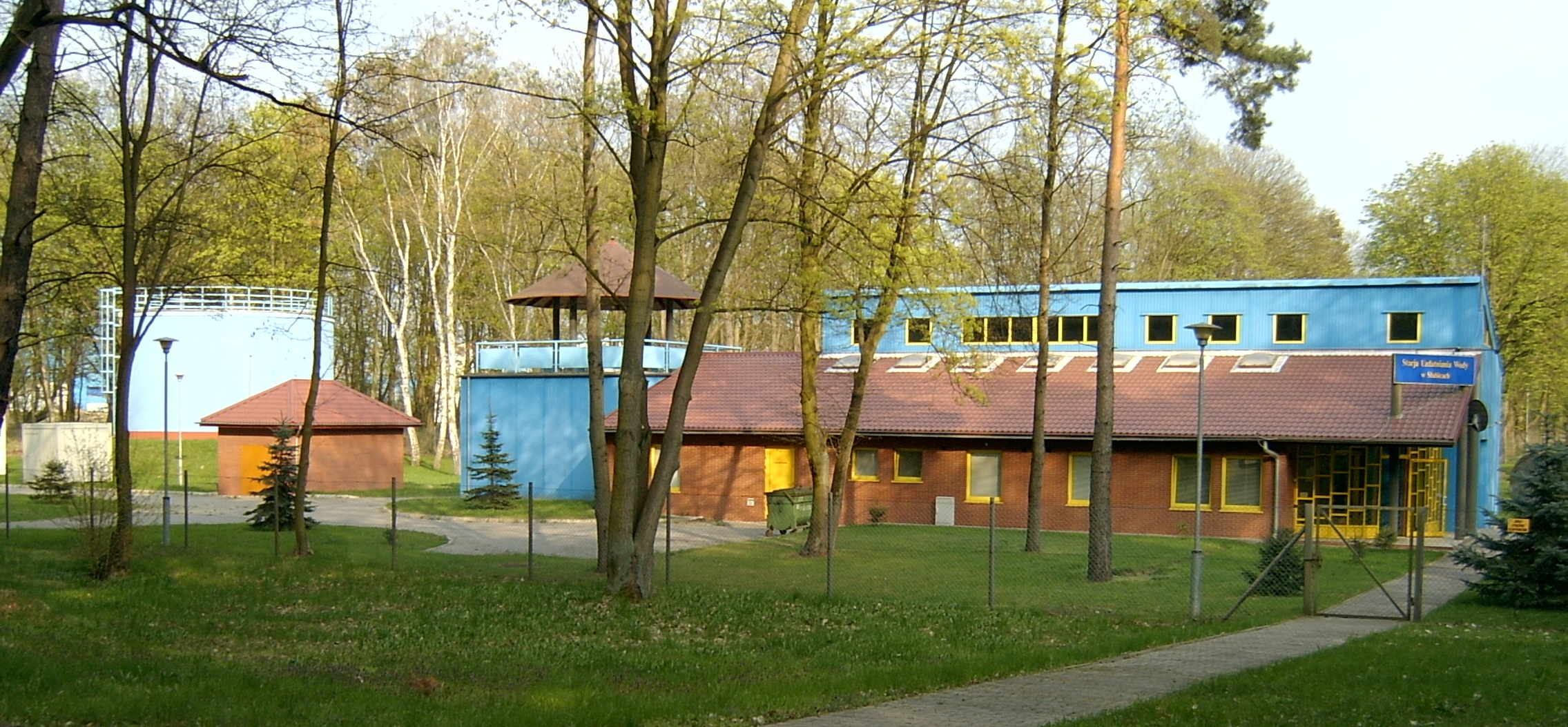 Słubice, stacja uzdatniania wody